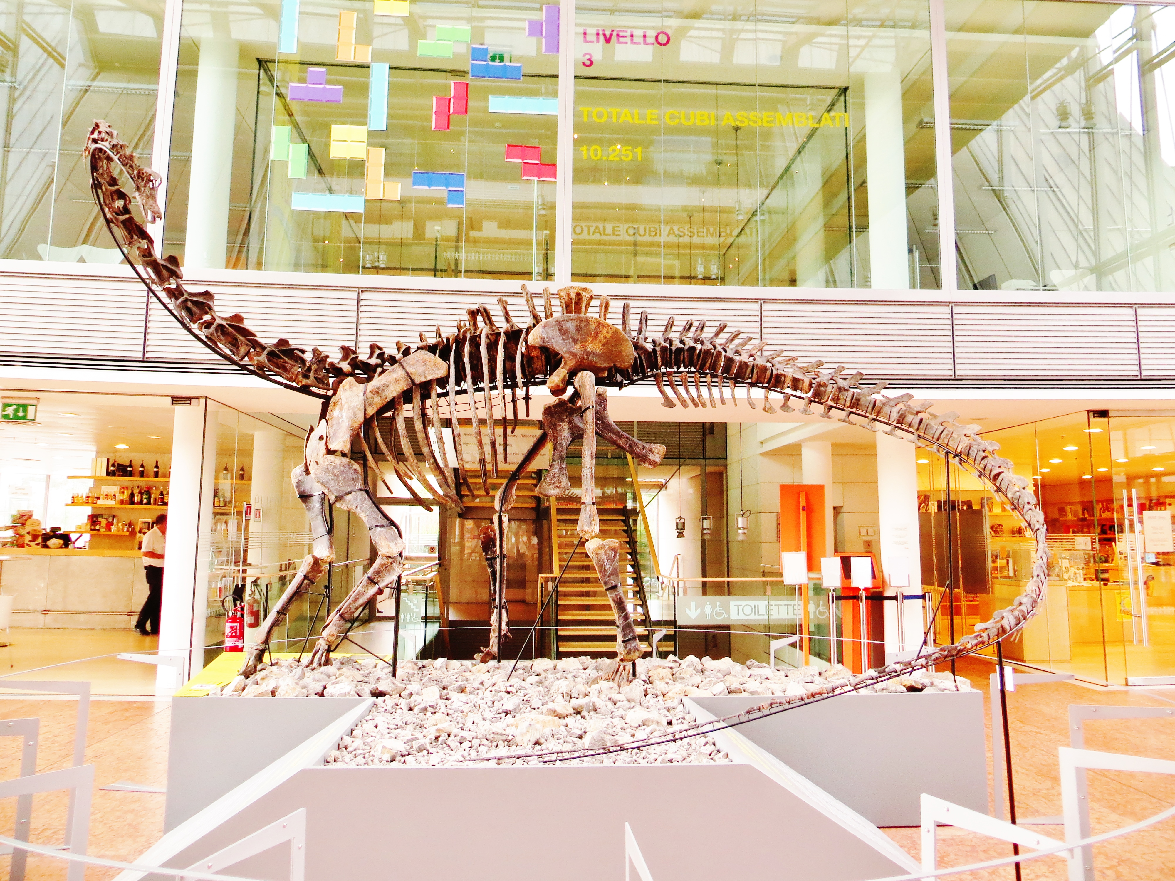 Fossil of Kaatedocus - Took the picture at Muse, Trento